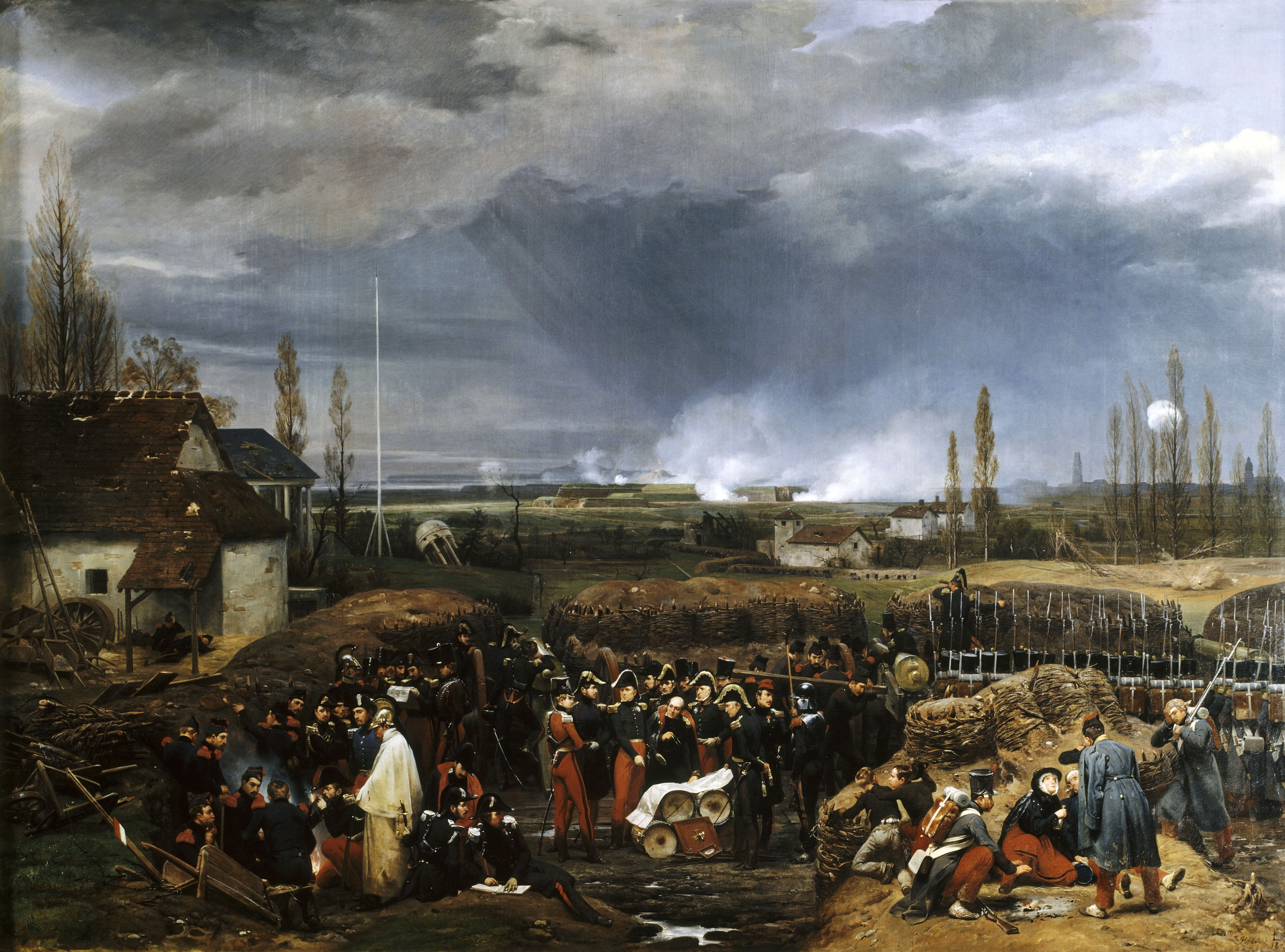 "Siège de la citadelle d’Anvers, 22 décembre 1832". Au centre de la toile, les deux fils aînés du roi Louis-Philippe, le duc de Namours (en rouge) et le duc d'Orléans (barbu, à droite de Nemours) en compagnie du maréchal Gérard (à droite d'Orléans), ministre de la guerre. Huile sur toile d'Horace Vernet commandée en 1840 par le roi Louis-Philippe pour le Musée de l'Histoire de France à Versailles.